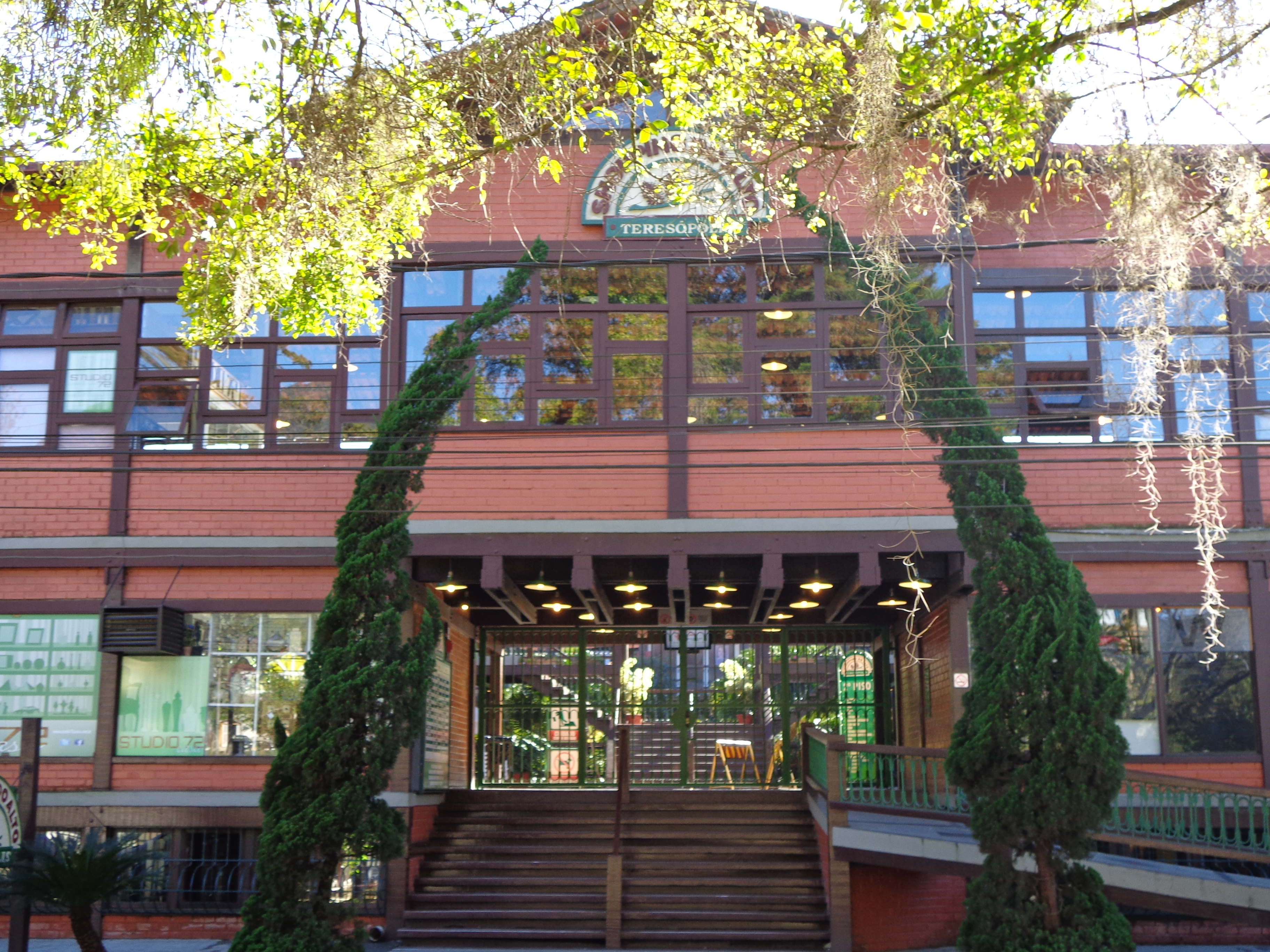 Teresópolis RJ Brasil - Shopping do Alto